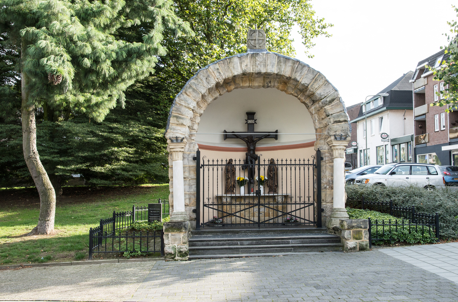 wegkapel anno 1925 te Landgraaf-Groenstraat. Architect: Anton Bartels